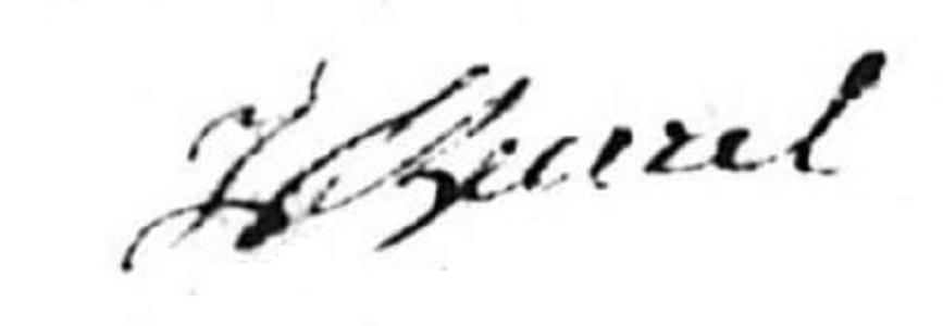 Signature de Jean Theurel au mariage de 1752